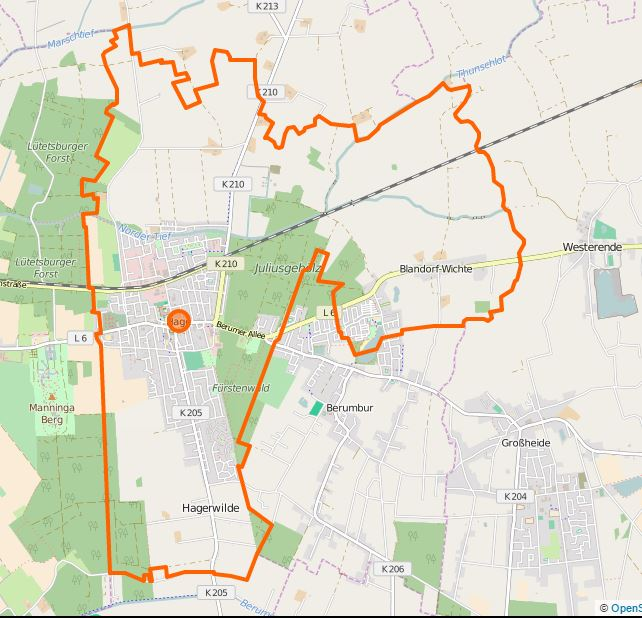 Die Karte zeigt den Flecken Hage mit seinen Ortsteilen